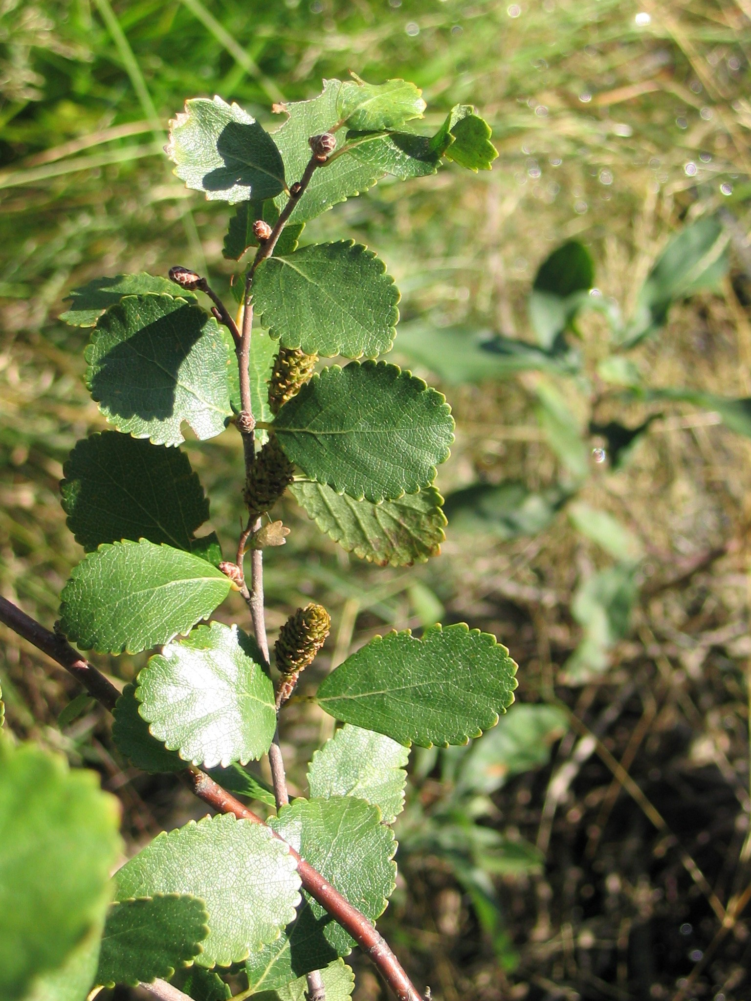 Betula pumila 1-eheep